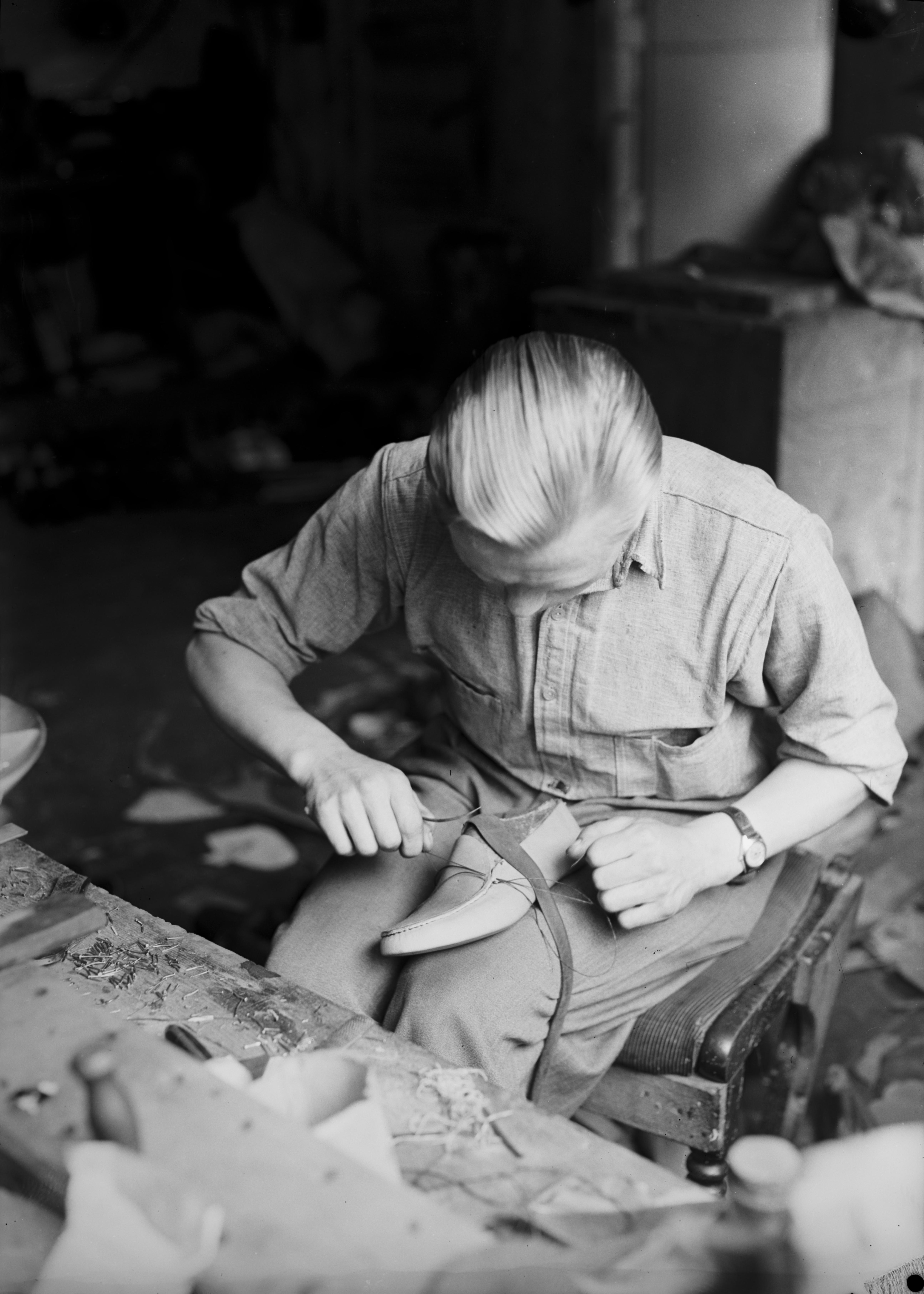 Bildet er hentet fra Nasjonalbibliotekets bildesamling. Anmerkninger til bildet var: Fotograf ukjent. Aurland, Sogn og Fjordane